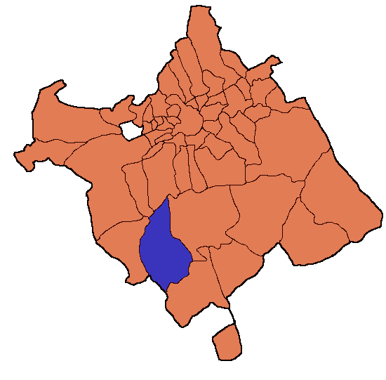 Situación de la pedanía de Corvera dentro de su municipio, Murcia. Pertenece a la comarca geográfica del Campo de Cartagena.